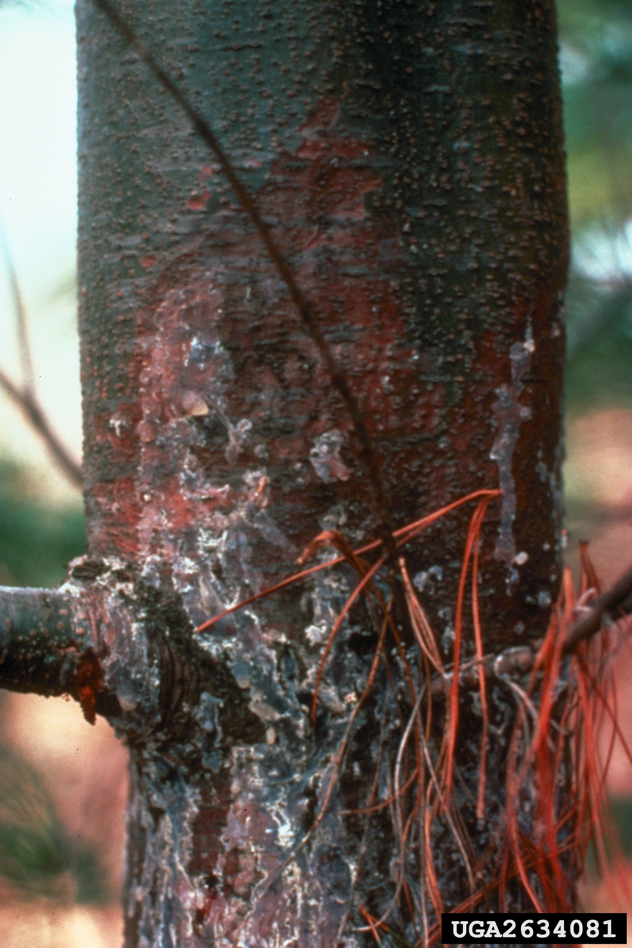 Cronartium_ribicola at Pinus strobus